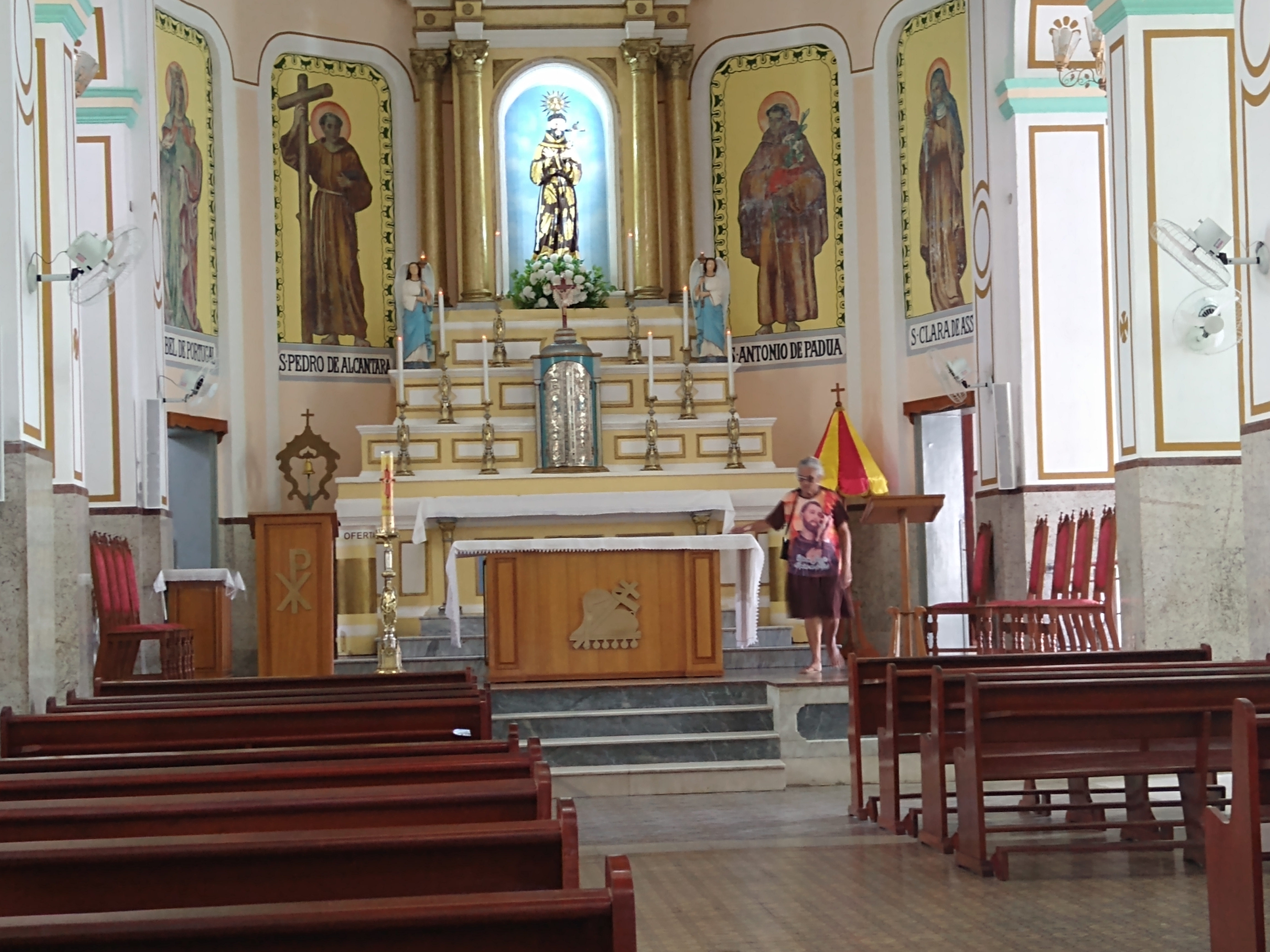 Vista lateral do Altar